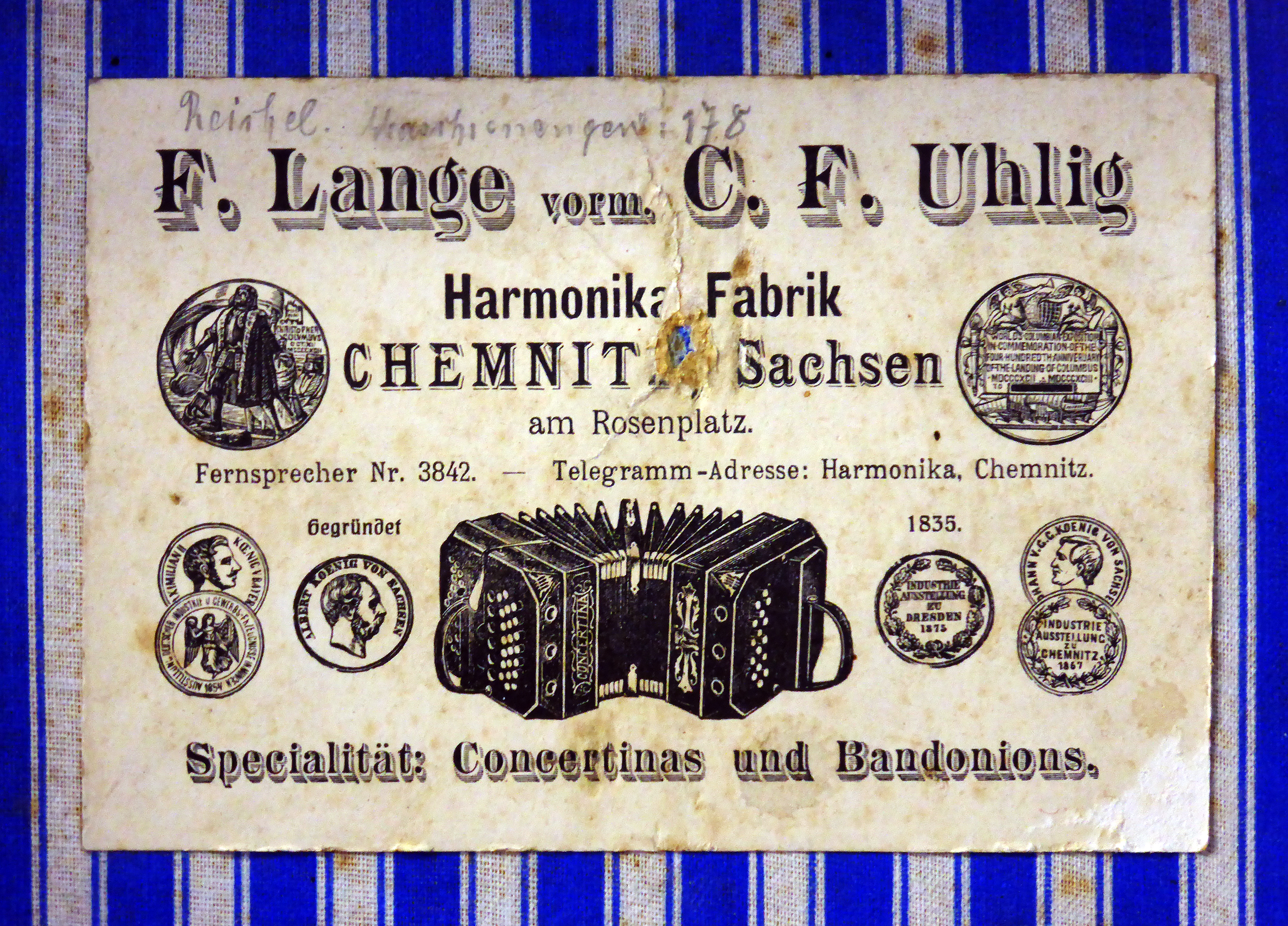 Kofferetikett von F.Lange vormals C.F.Uhlig Harmonika Fabrik. Ausgestellt im Museum sächsisch-böhmisches Erzgebirge in Marienberg.